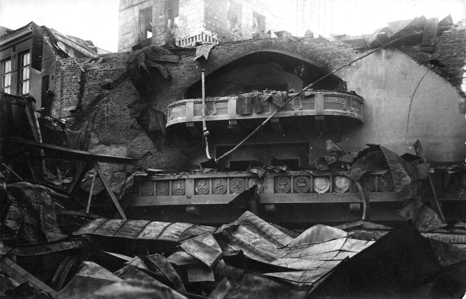 Helsingin työväentalo tulipalon jälkeen sisällissodan päättyessä.